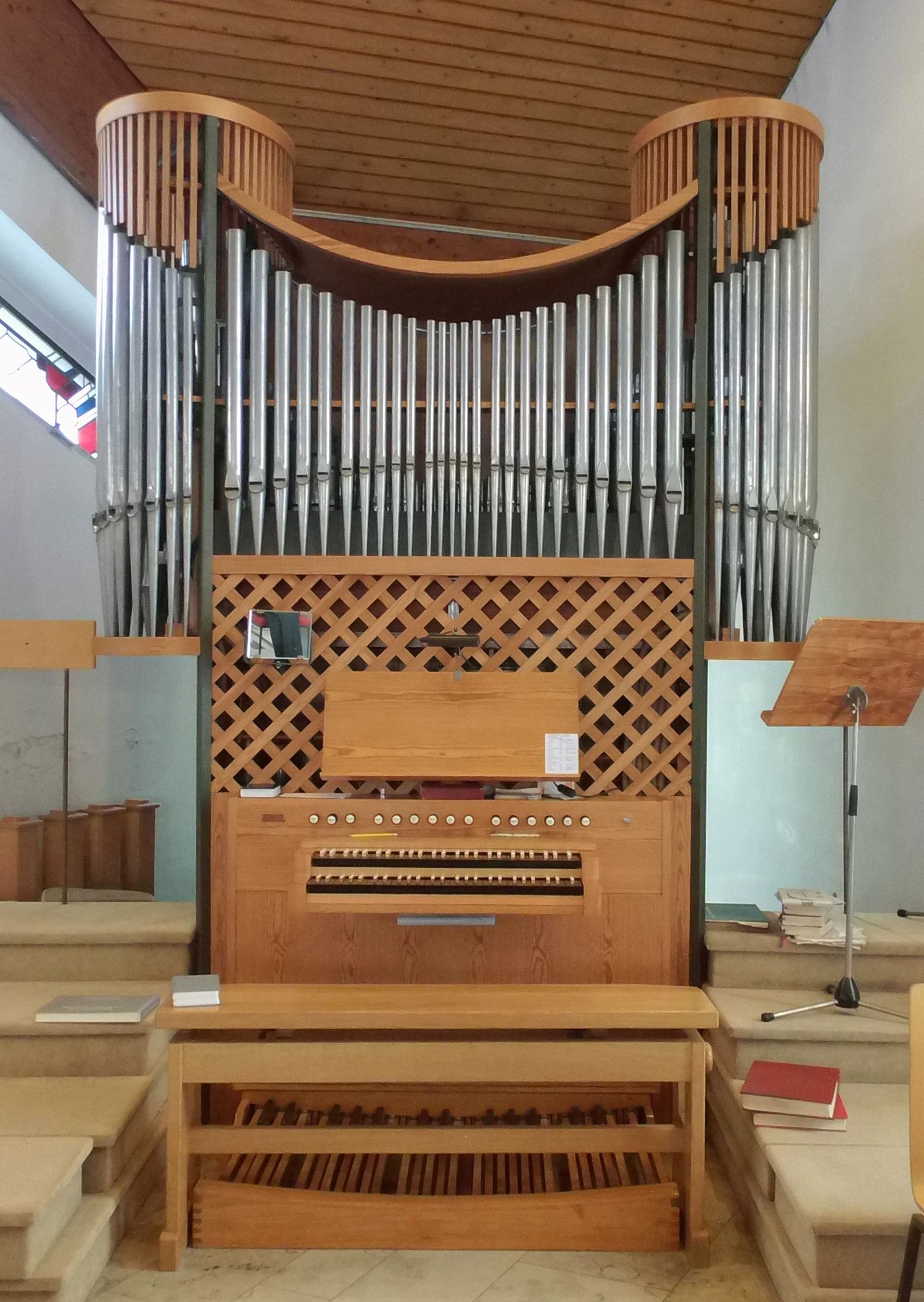 Orgel der katholischen St.-Elisabeth-Kirche in Wolfsburg